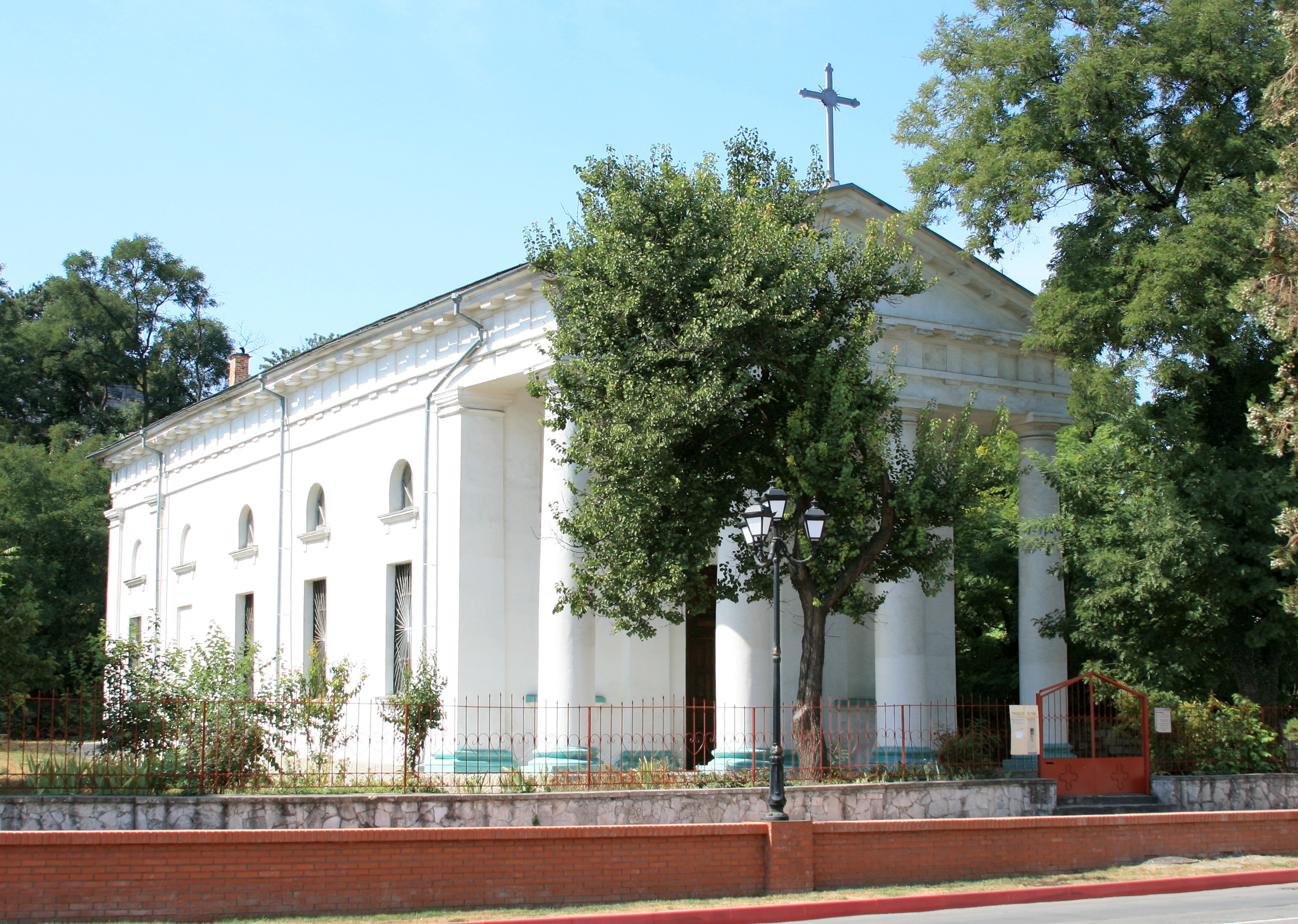 Римокатолический костёл Успения в Керчи